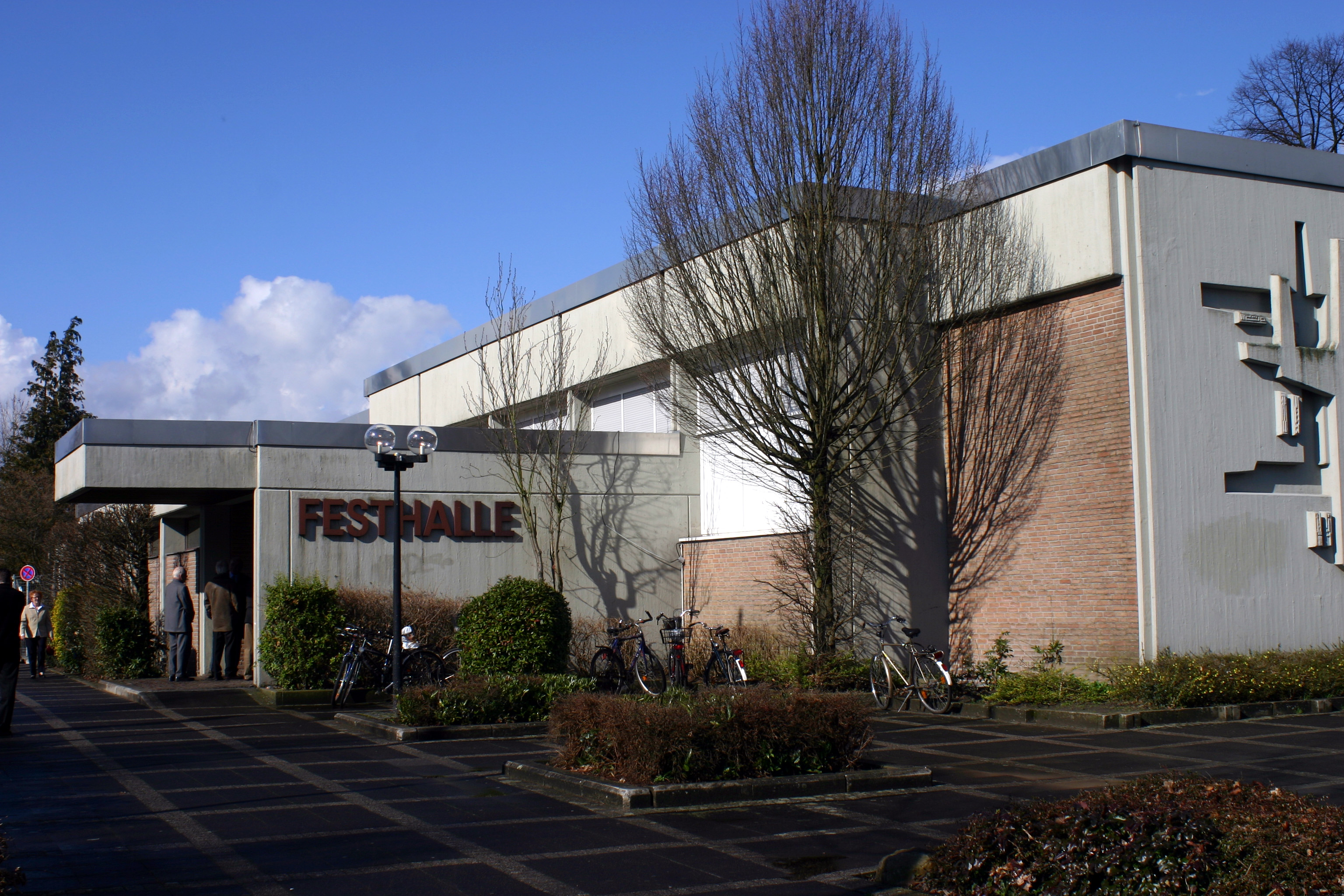 die Festhalle im westfälischen Everswinkel